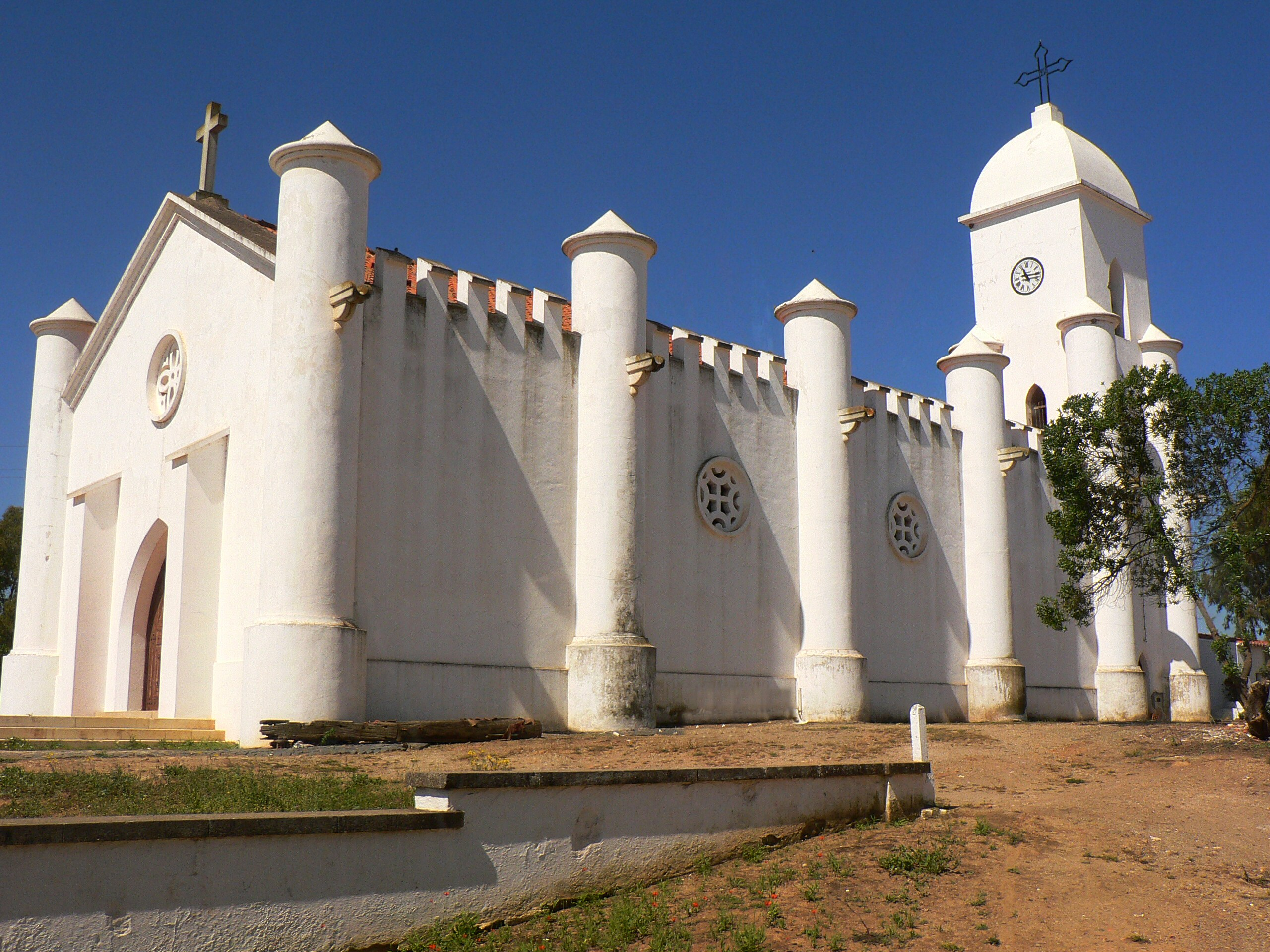 Igreja da Mina de São Domingos